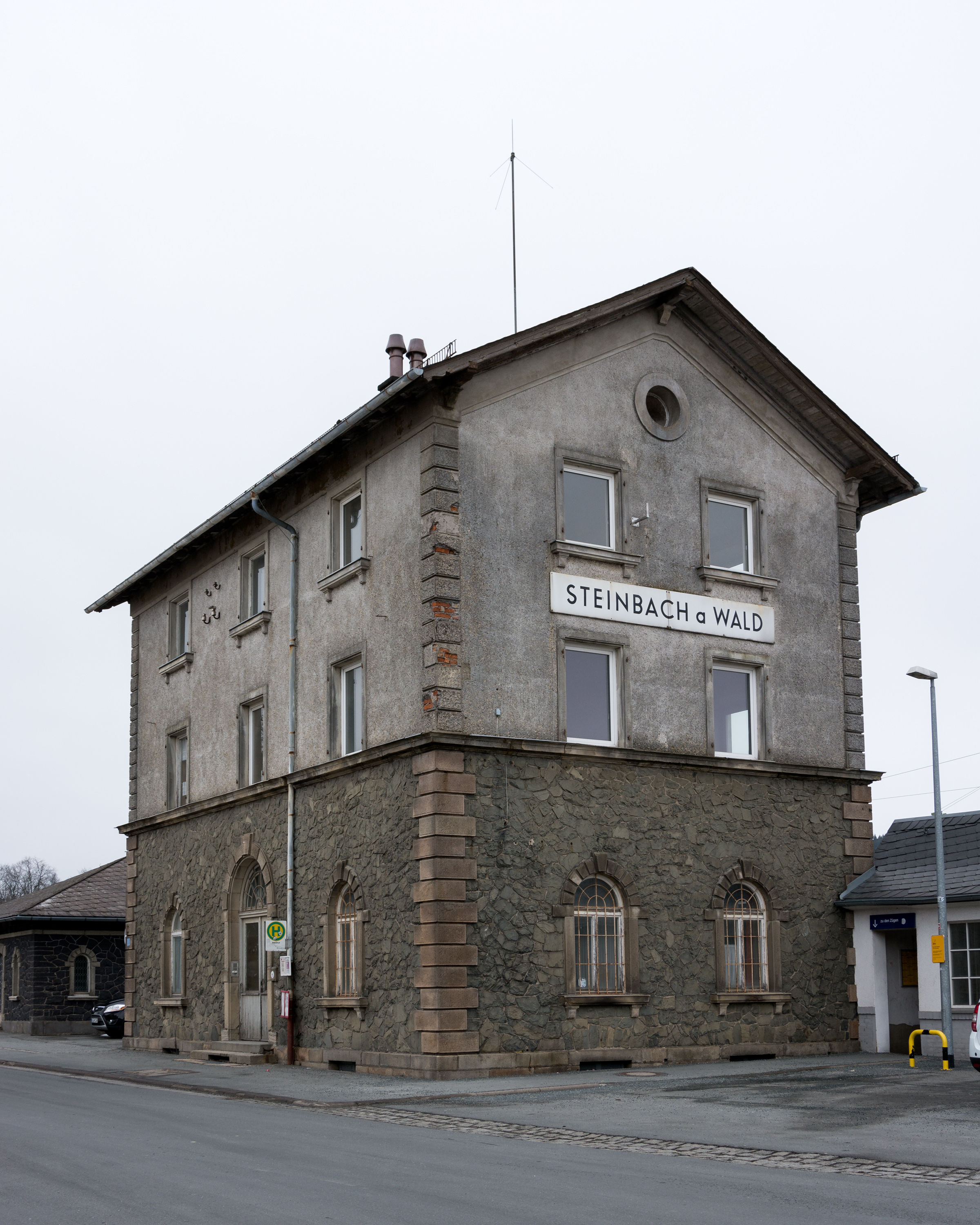 Bahnhof Steinbach am Wald – Hauptgebäude